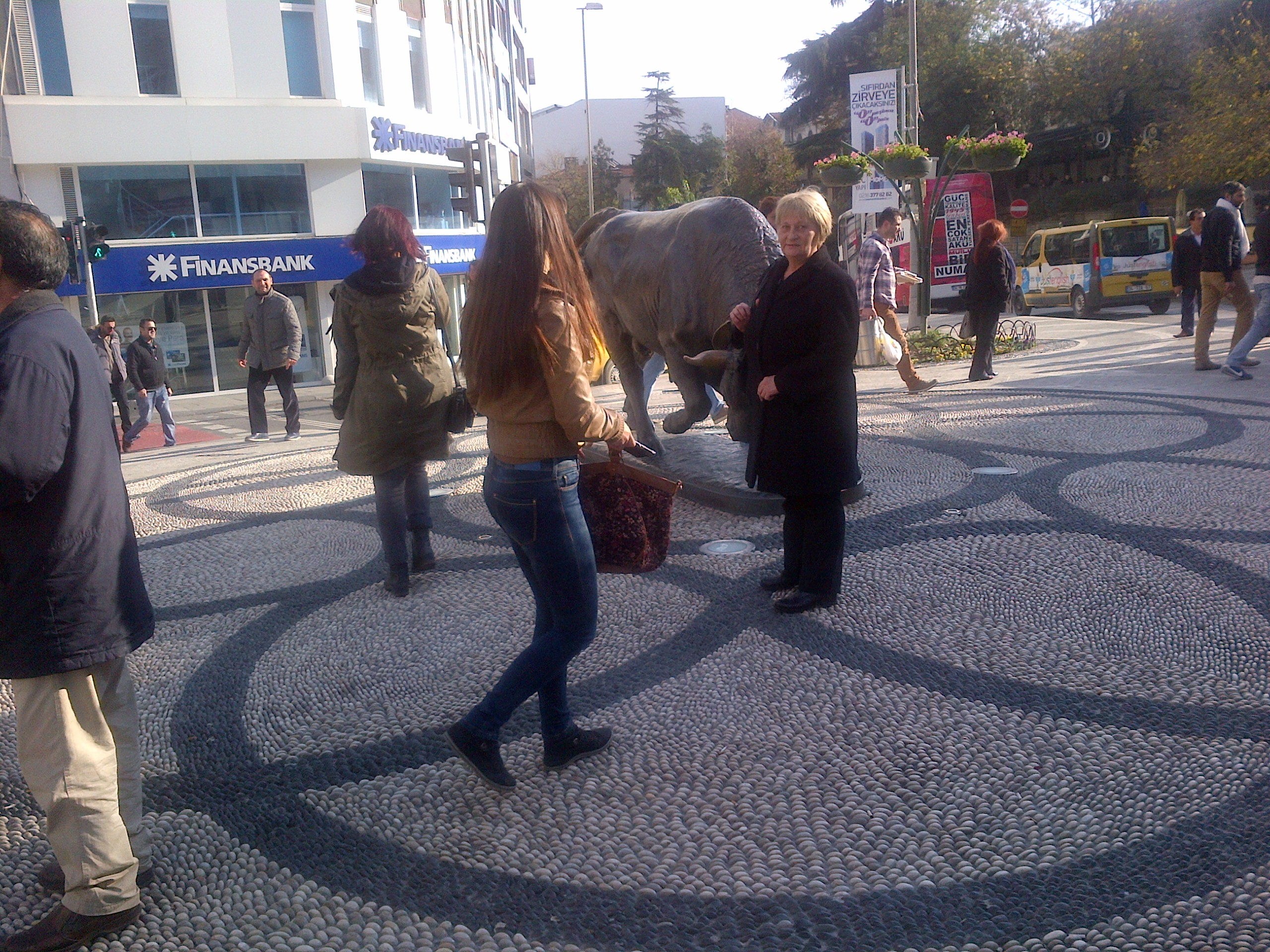 La estatua de toro en la plazuela Altıyol (Seis Caminos) se puede considerar uno de los simbolos de Kadıköy. La gente local da citas para juntarse aqui y para los que vienen de afuera es un punto para fotografiarse.